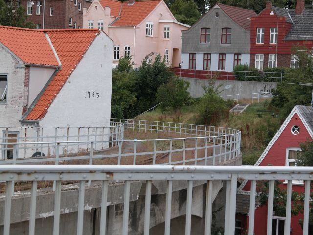 Reste der Hafenbahn in Sonderborg